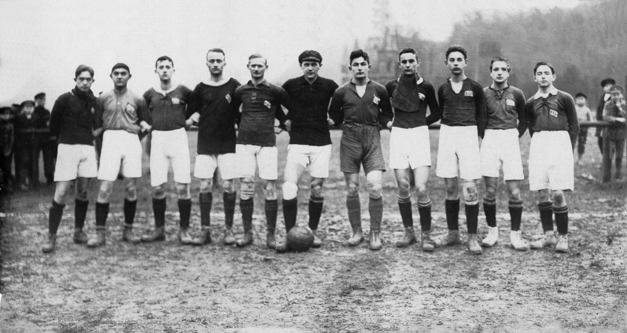 DSC-LR gegen Meißen (1921), 4.v.l. Erich Haubold